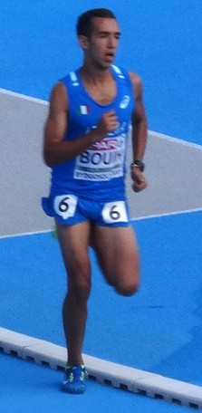 Młodzieżowe Mistrzostwa Europy w Lekkoatletyce U23 w Bydgoszczy 13-16 lipca 2017, kwalifikacje biegu na 1500 m mężczyzn